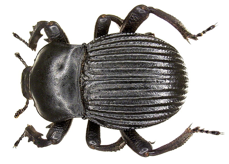 Familie: Tenebrionidae Groesse: 16-20 mm Fundort: Namibia, Omaruru leg. U.Schmidt, 1994; det. M.Lillig Photo: U.Schmidt, 2006